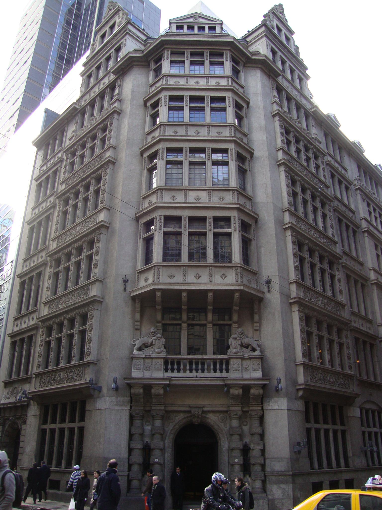 Vista del acceso al edificio de Bunge y Born. Lavalle y 25 de Mayo, Buenos Aires. Arquitecto: Pablo Naeff Año: 1925 Estilo: Neogótico flamenco